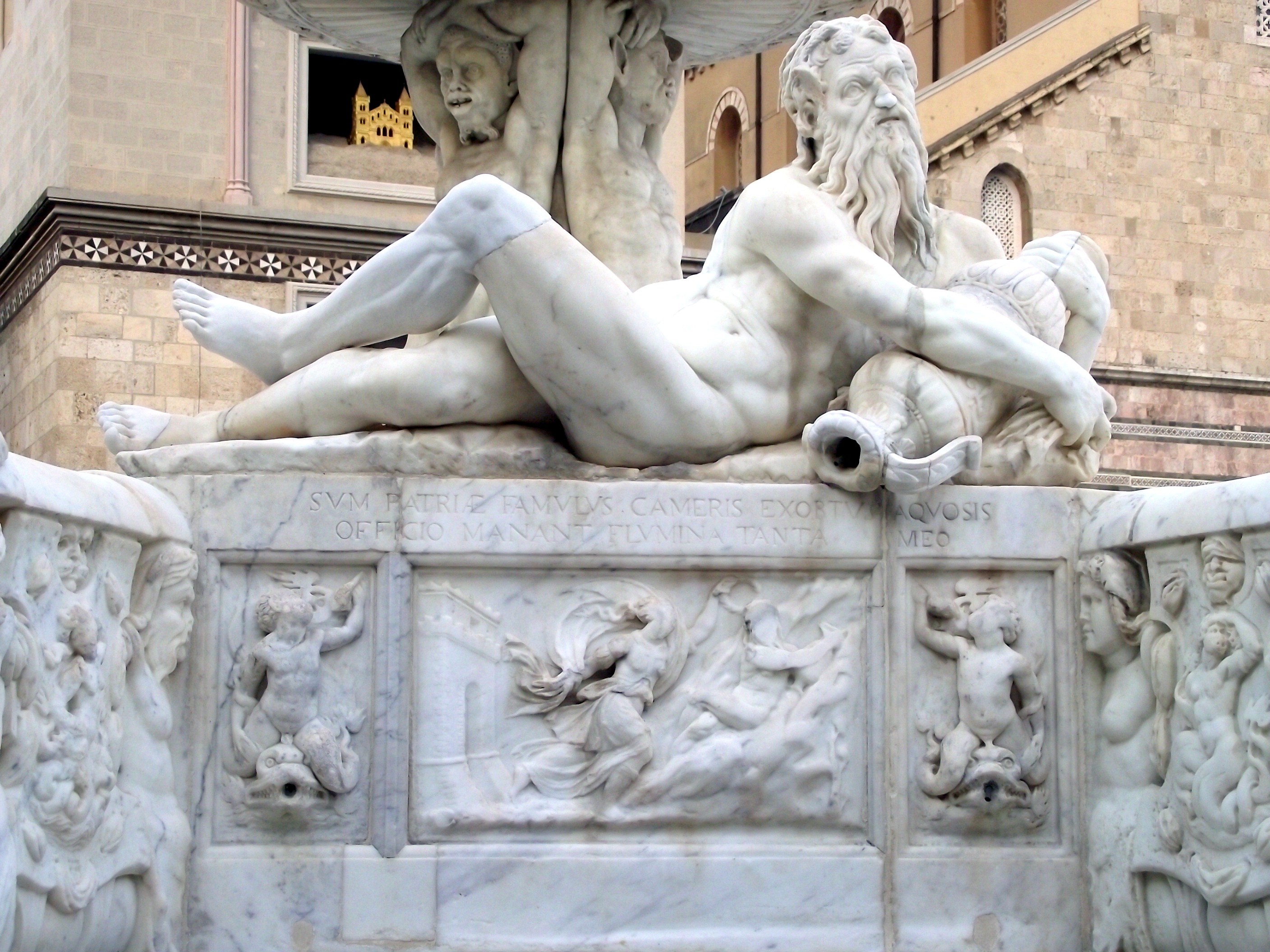 rappresentazione del fiume Camaro